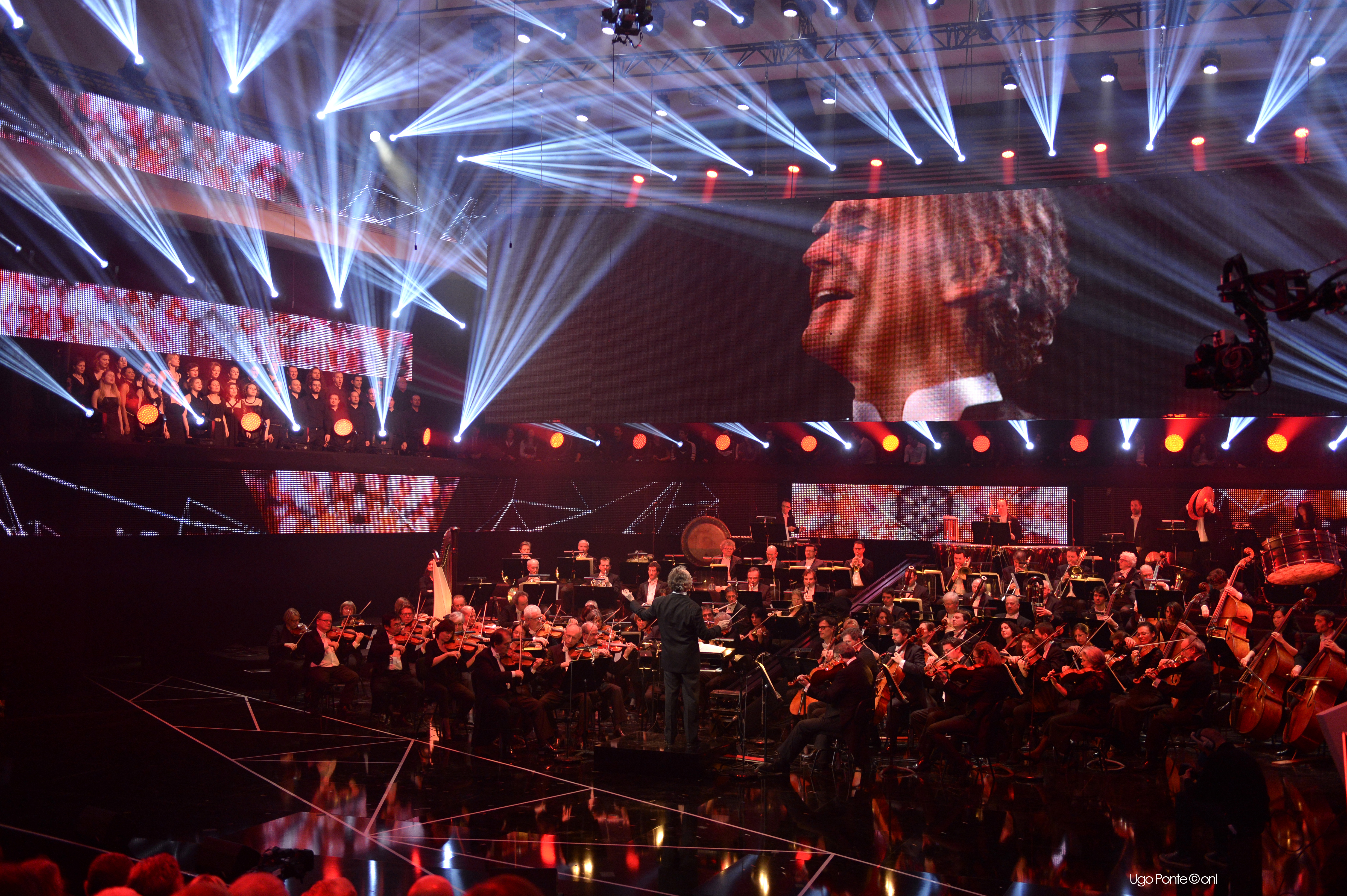 22ème victoire de la musique classique à l'auditorium du Nouveau Siècle à Lille